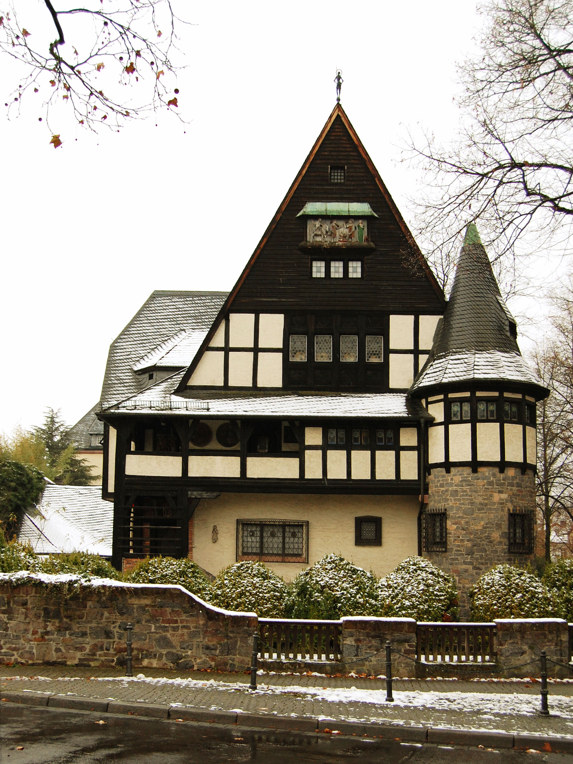 Haus Gentil - widok ogólny